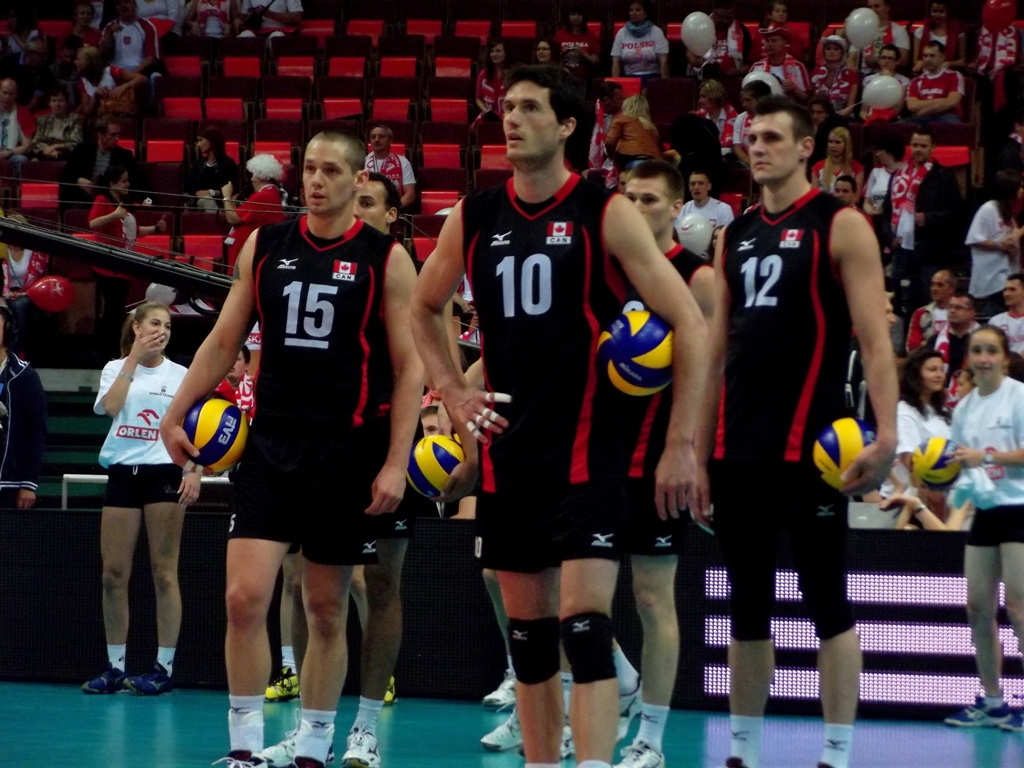 Zdjęcie zrobione podczas zawodów Ligi Światowej 2012 w katowickim Spodku.